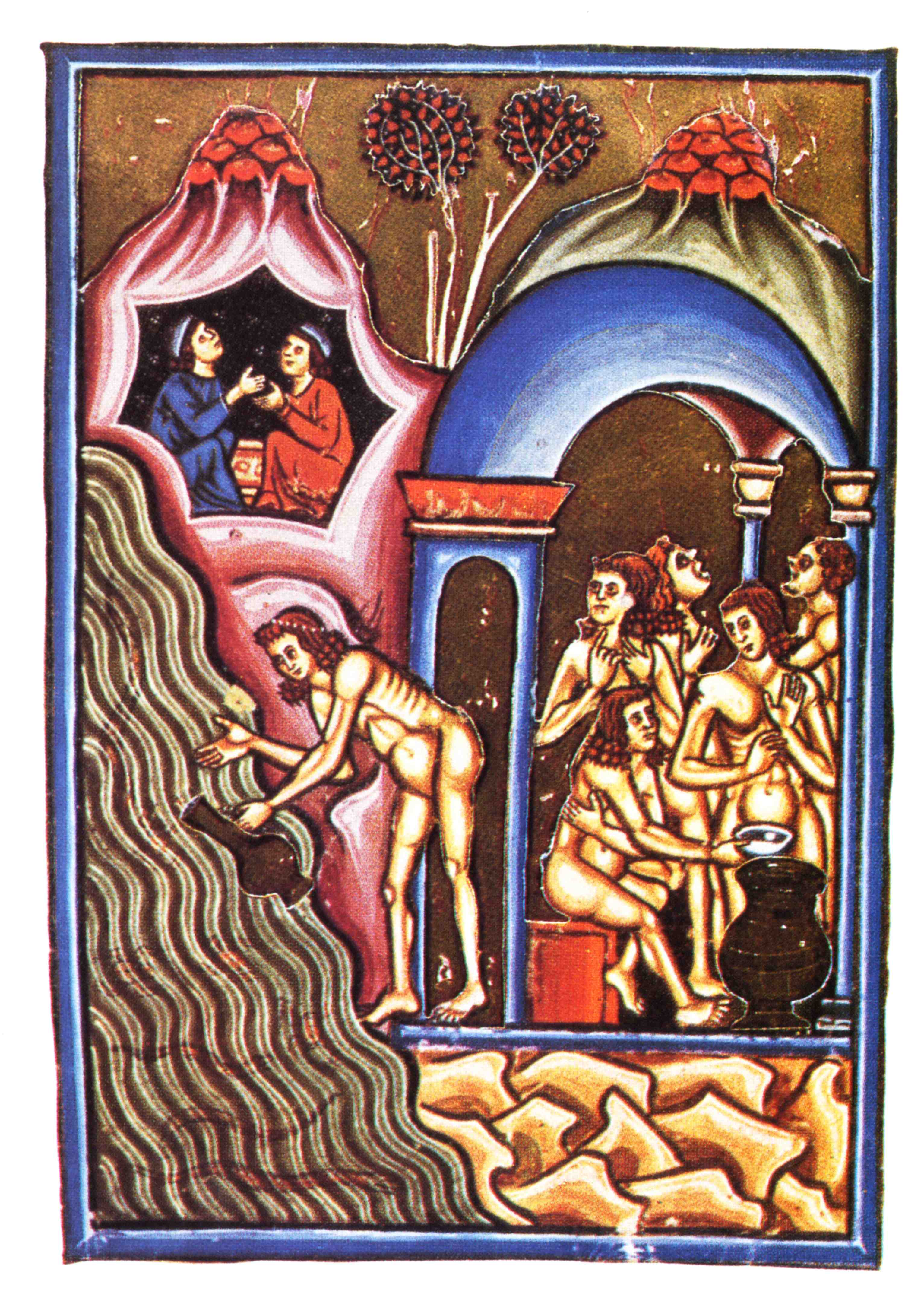 Pietro da Eboli (XIII secolo) "De Balneis Puteolanis". Miniatura del Codice Angelico Ms. 1474 (Biblioteca Angelica di Roma), che mostra il "Balneum Sudatorium" (conosciuto anche come "Stufe di San Germano"), corrispondente alle sorgenti termali di Agnano. La miniatura mostra un sudatorium (sauna), ed un uomo che attinge con una brocca acqua fresca dal lago, infestato da rane e serpenti. Sullo sfondo, nelle viscere della terra, vi è San Germano che, venuto in queste terme per curarsi, prega Iddio di liberare l'anima del diacono Pascasio, condannato a patire le pene del purgatorio nelle calde esalazioni di questo luogo poiché aveva favorito in vita l'antipapa Lorenzo contro Simmaco I.